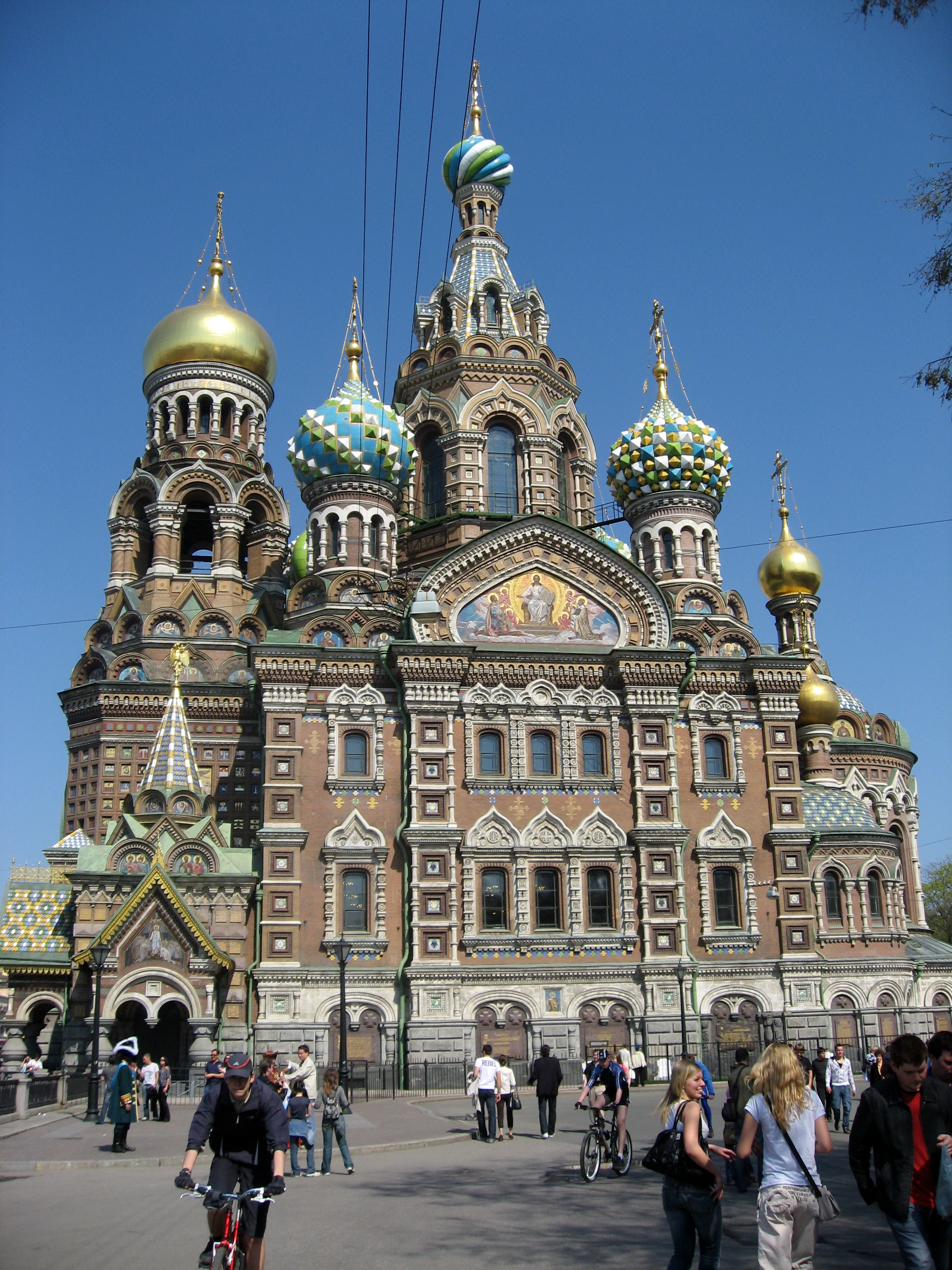 Chrám zmrtvýchvstání Ježíše Krista